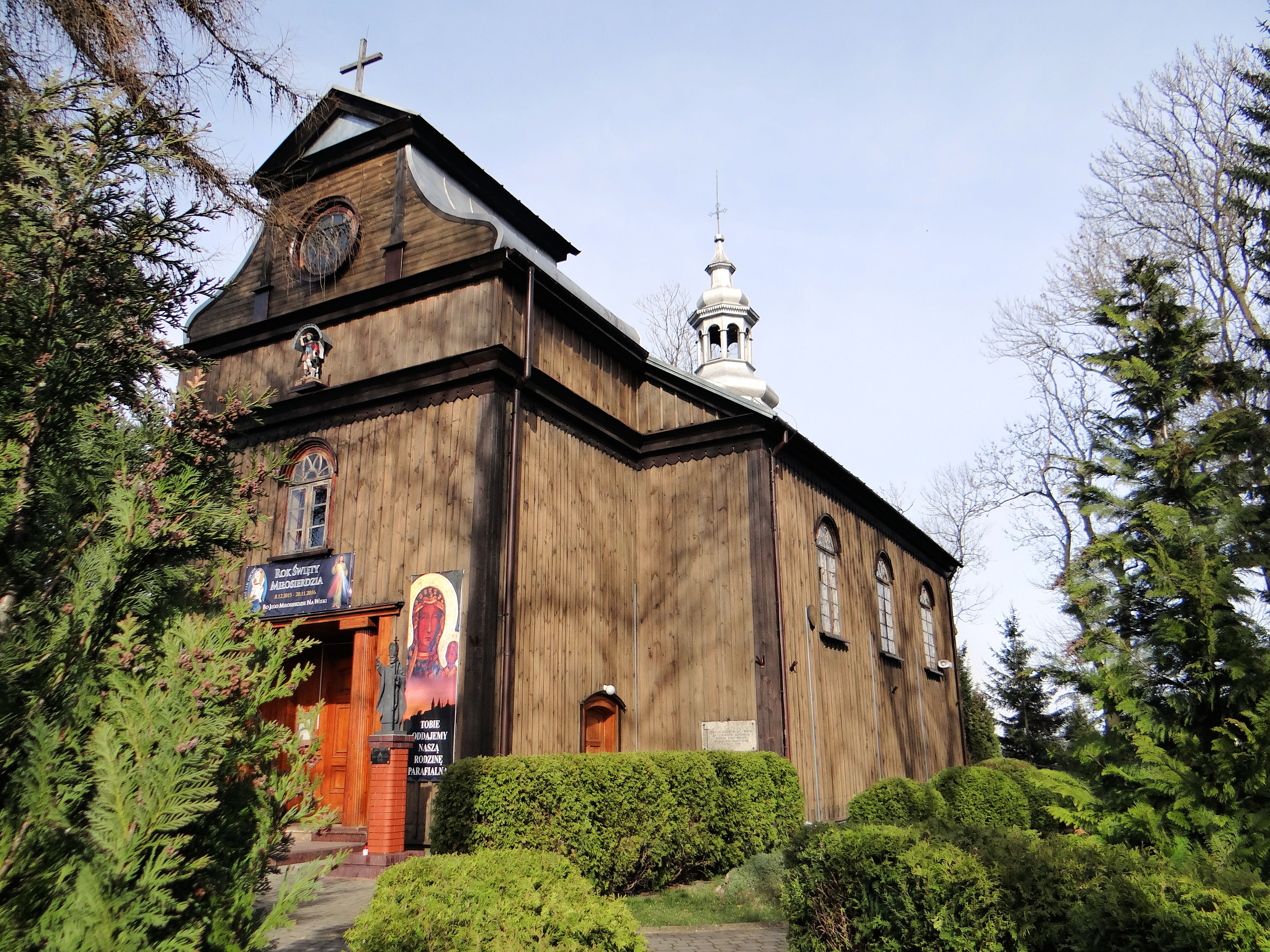 Ciemniewko, kościół par. św. Mikołaja, 1880